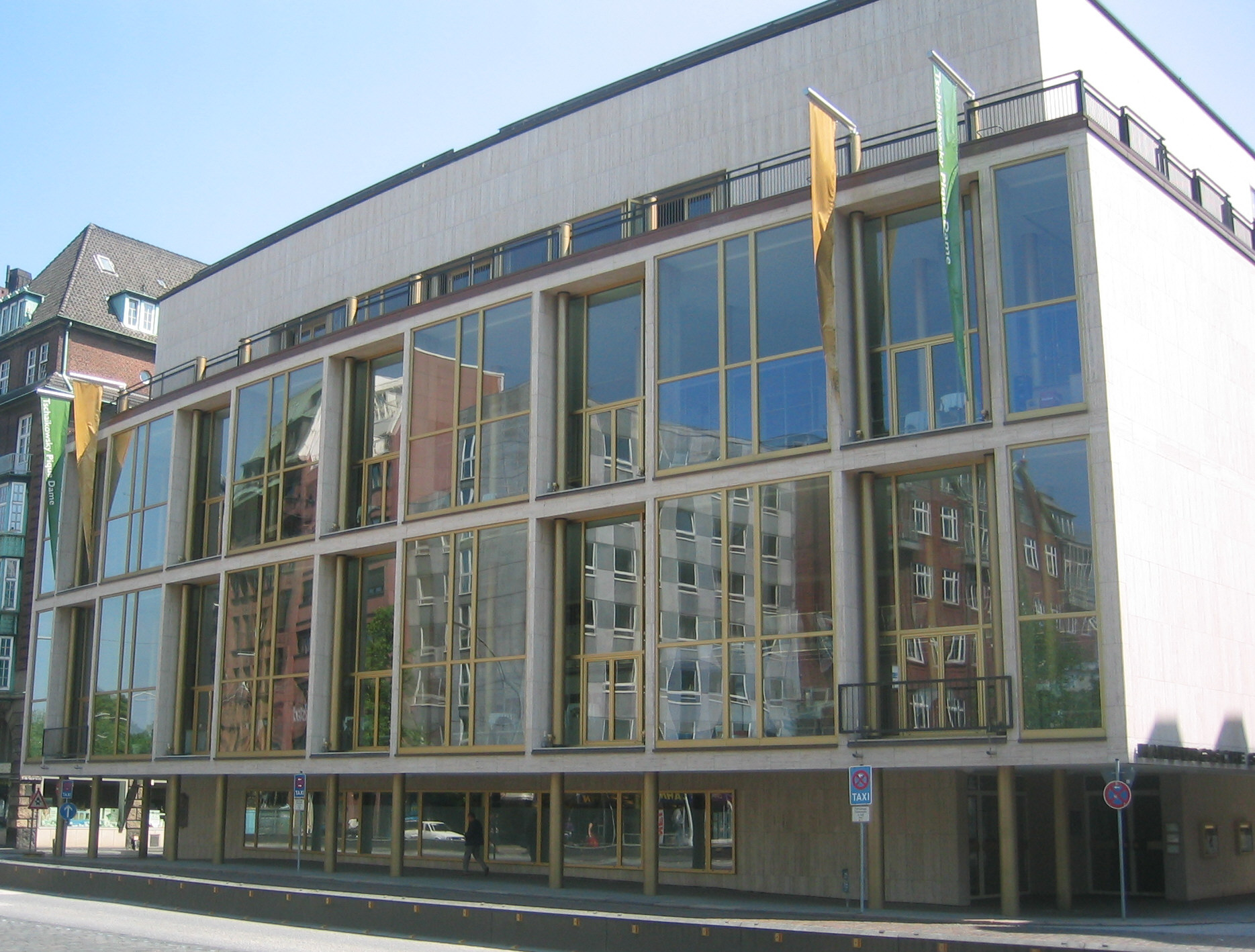 Hamburg: Hamburgische Staatsoper (Hamburg State Opera) This is a photograph of an architectural monument.